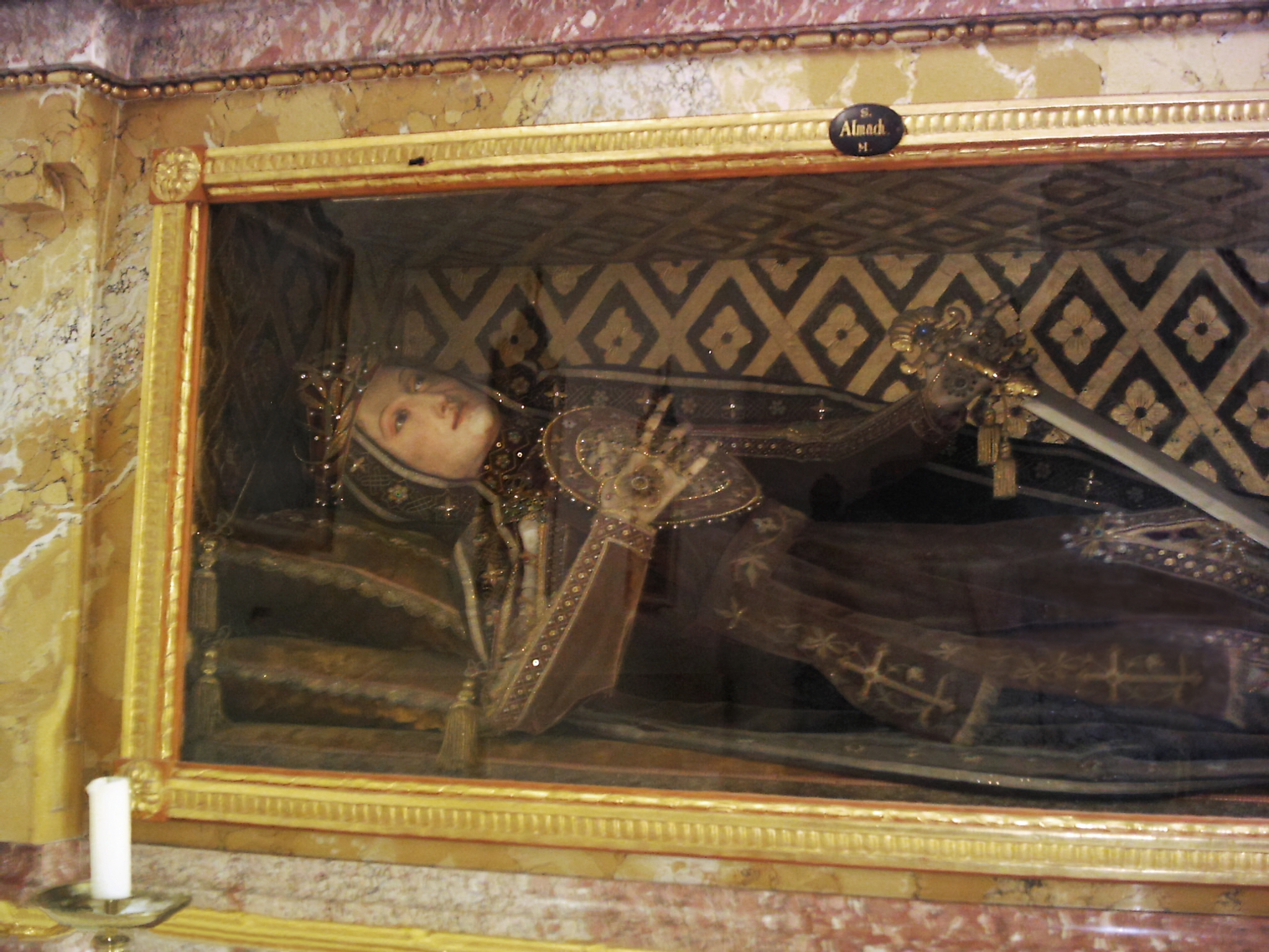 Altar des Hl. Almachus (Märtyrer) in der röm.-kath. Kirche St. Verena in Rot a. d. Rot Dem Hl. Almachus geweiht, einem Einsiedler, der in Rom den Märtyrertod erlitt. Sein Hl. Leib gelangte 1788 aus dem Kloster St. Anna in Bregenz, wo er seit dem 14. Jh. aufbewahrt worden war, nach Rot an der Rot und wurde 1910 von den Schwestern in Bonlanden neu gefasst.